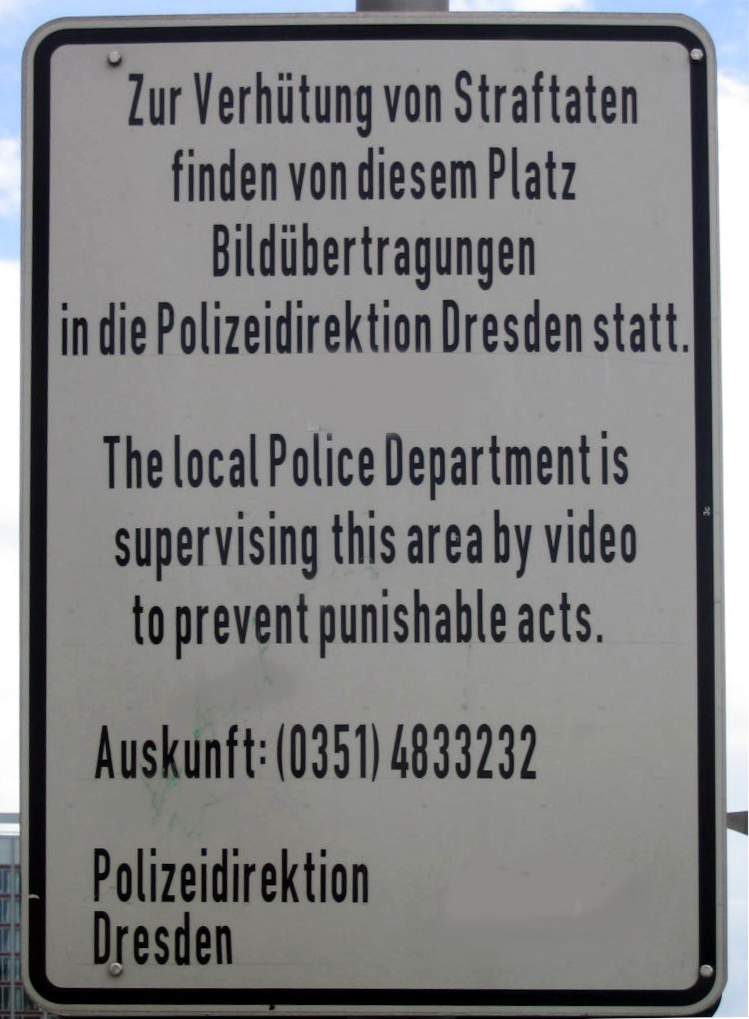 Hinweis auf Video-Überwachung in der Dresdner Innenstadt.